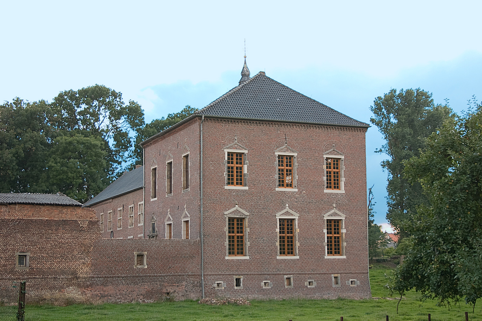 Haus Bluementhal, Hückelhoven-Brachelen.